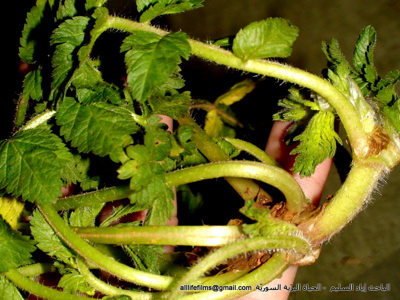 نباتات برّية سورية تؤكل